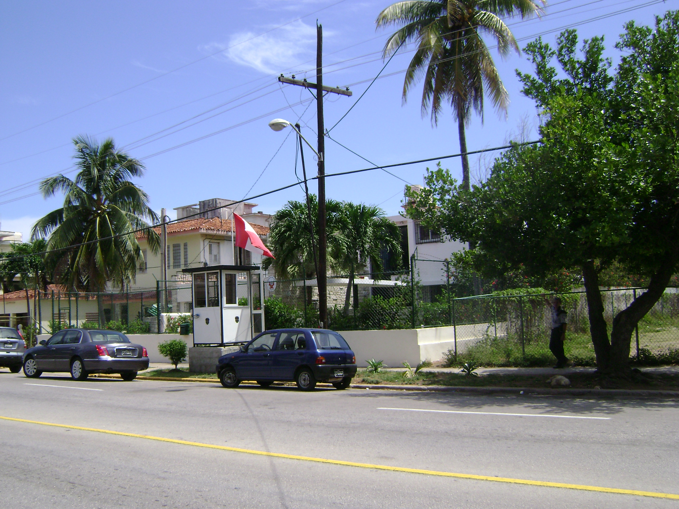 Una fotografía de la hermosa embajada de Perú, en Cuba.